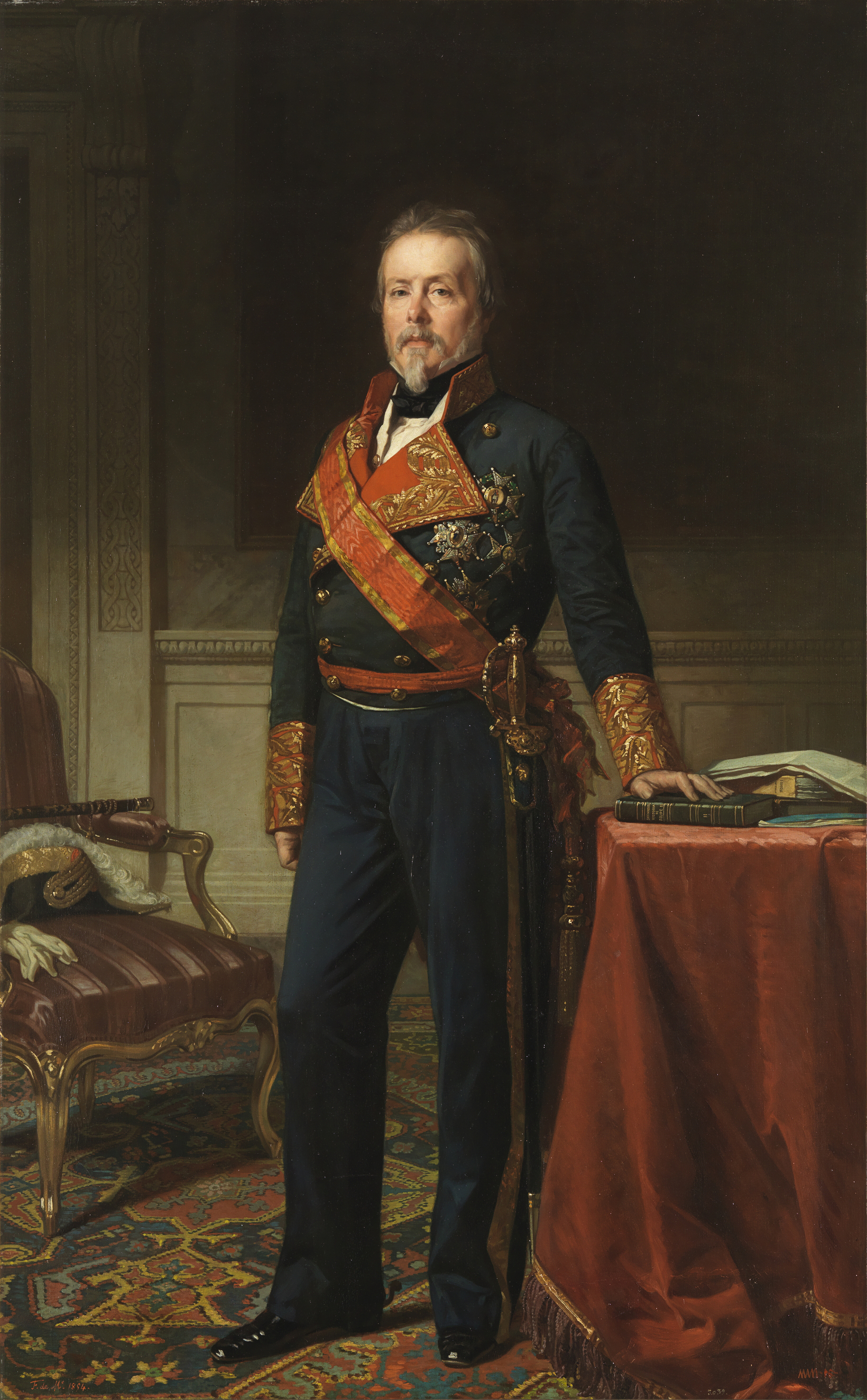 Retrato del general Evaristo Fernández de San Miguel (1785-1862). Fue duque de San Miguel, y también militar, político e historiador.